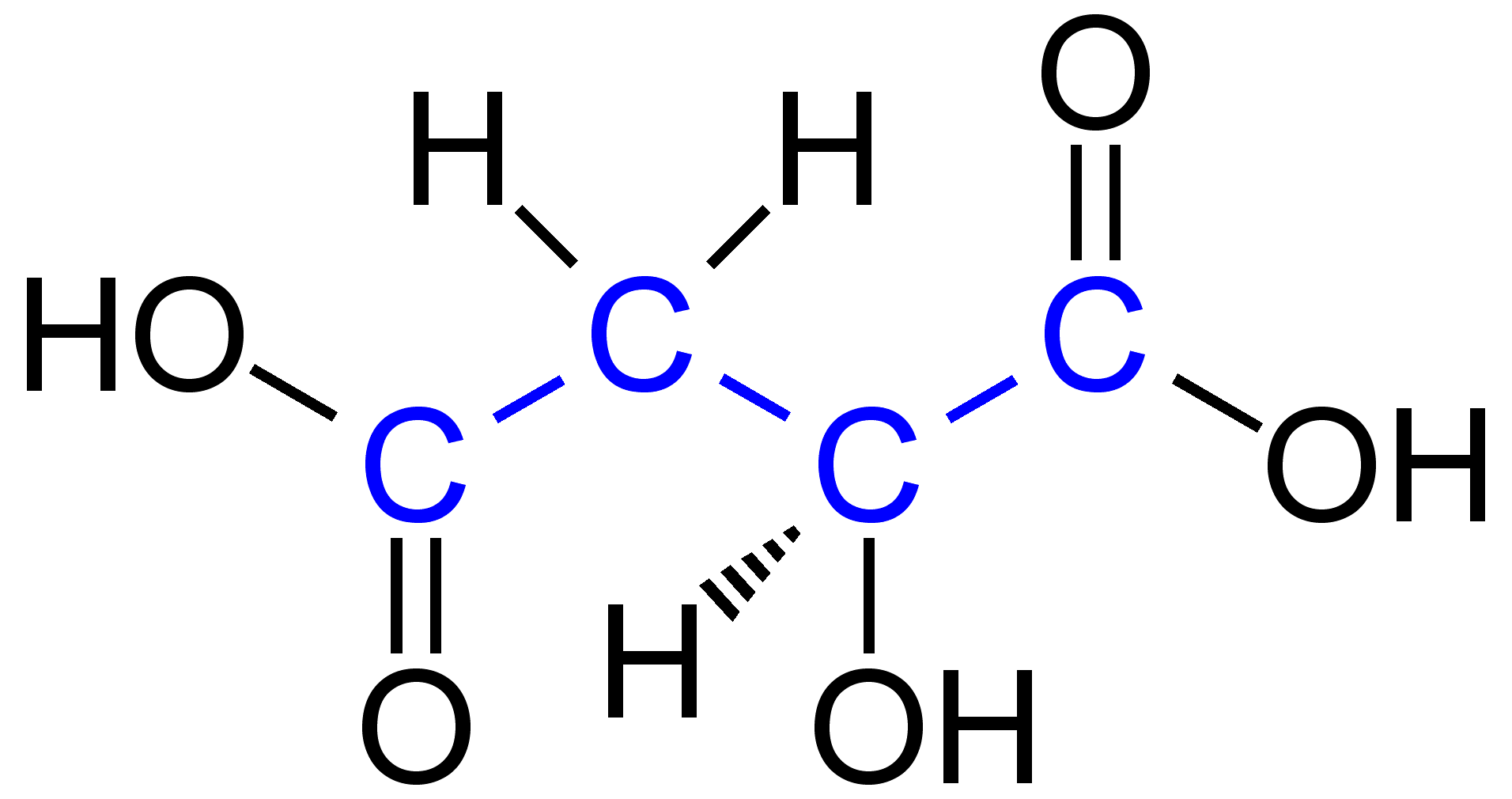 L-Malic_Acid_(blue)_Formula